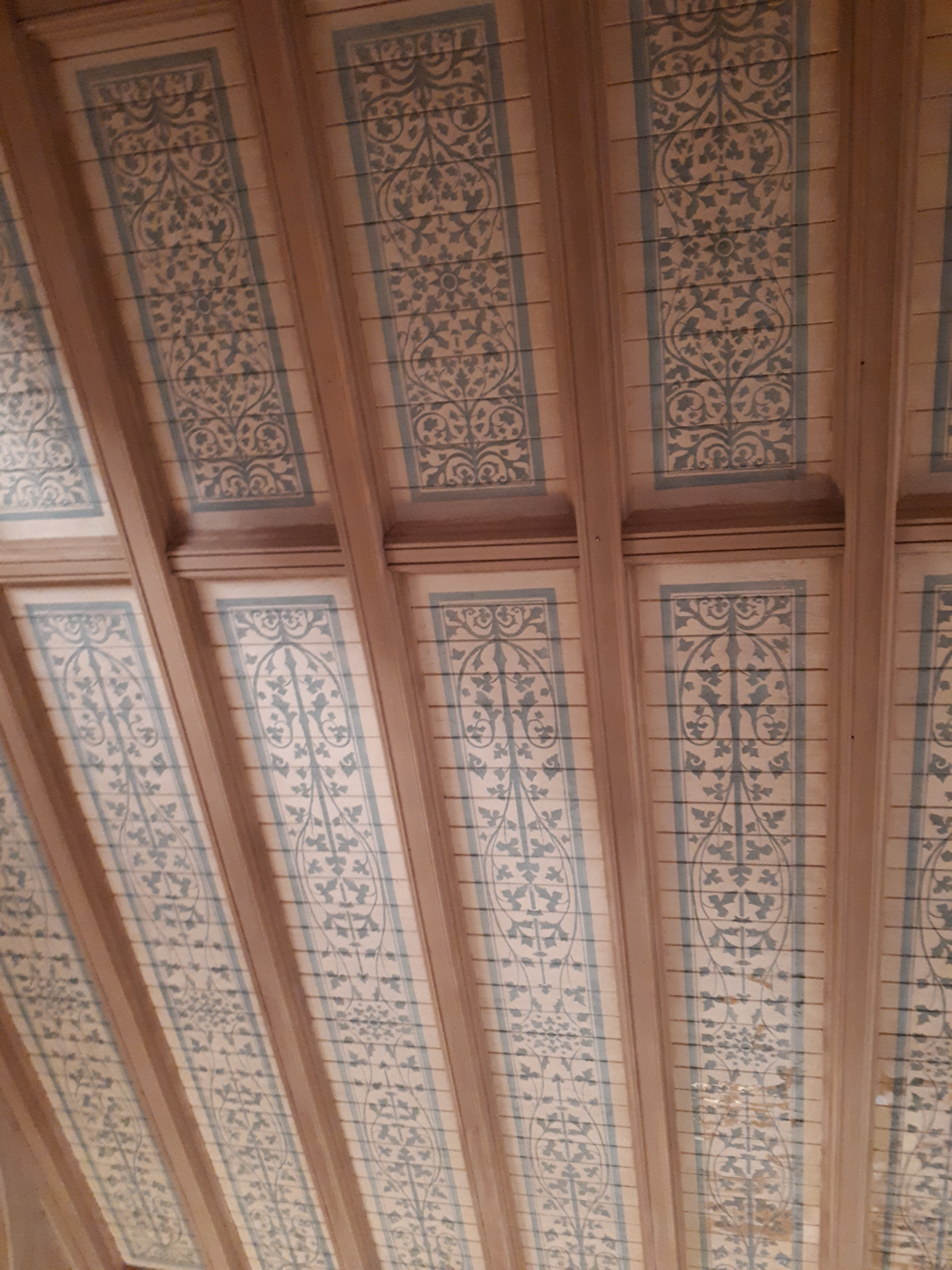 Dieses Bild zeigt die Decke der Dorfkirche Chemnitz nach der Innenraumsanierung 2018